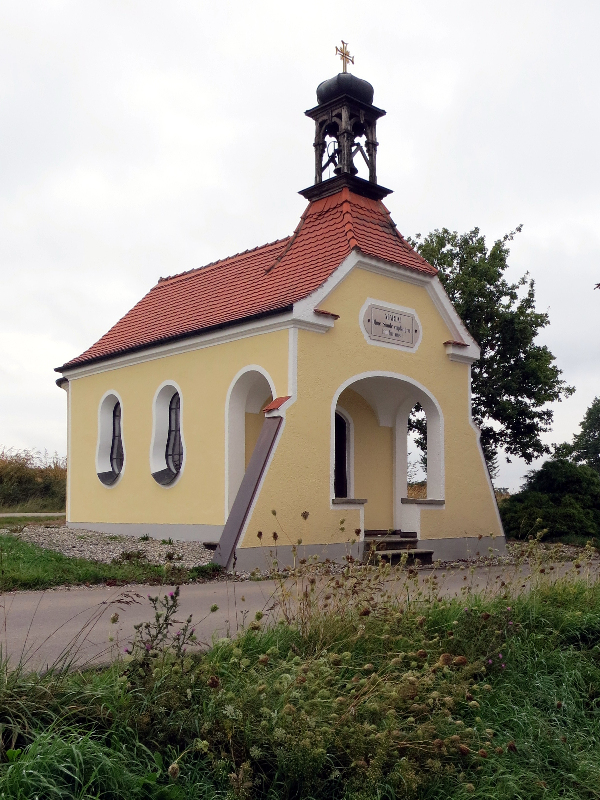 Katholische Kapelle St. Maria in Schauerschorn, Gemeinde Altomünster; Ansicht aus SüdWest